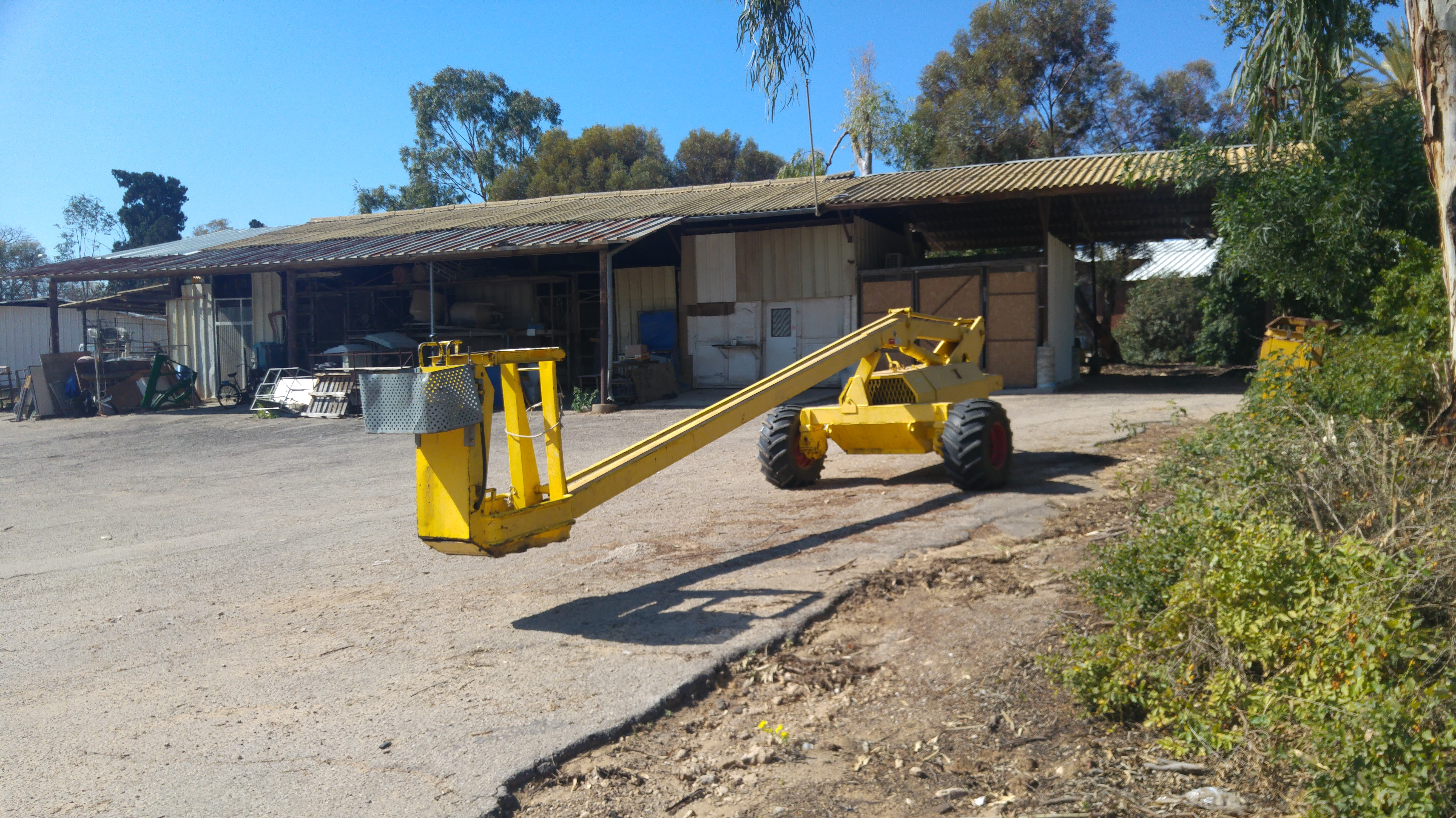 אפרון (ידוע גם בשם מיכלזון או מיכלסון[1]) הוא מנוף מתנייע